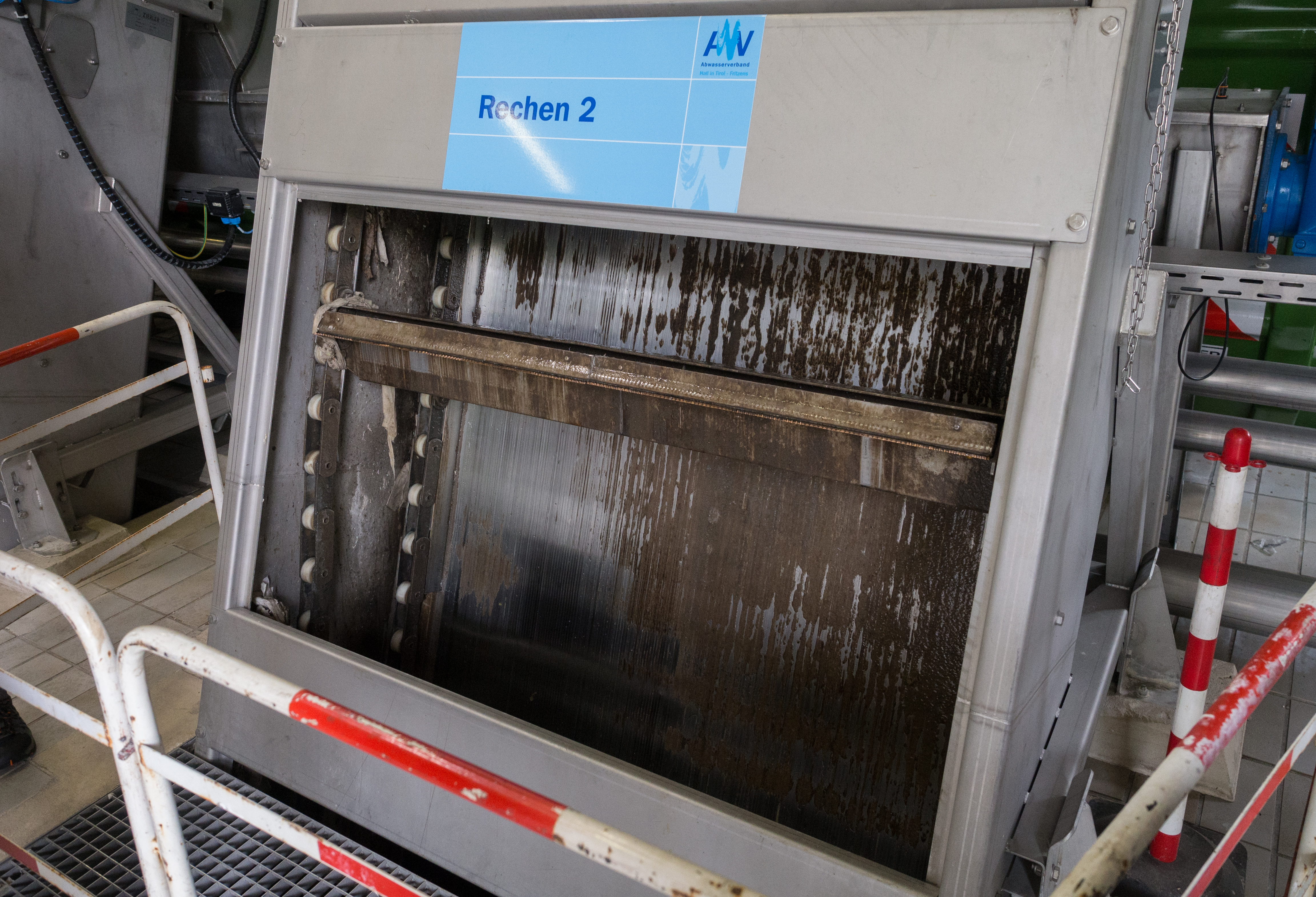 Einer der Rechen in der Kläranlage Fritzens des Abwasserverbands Hall-Fritzens